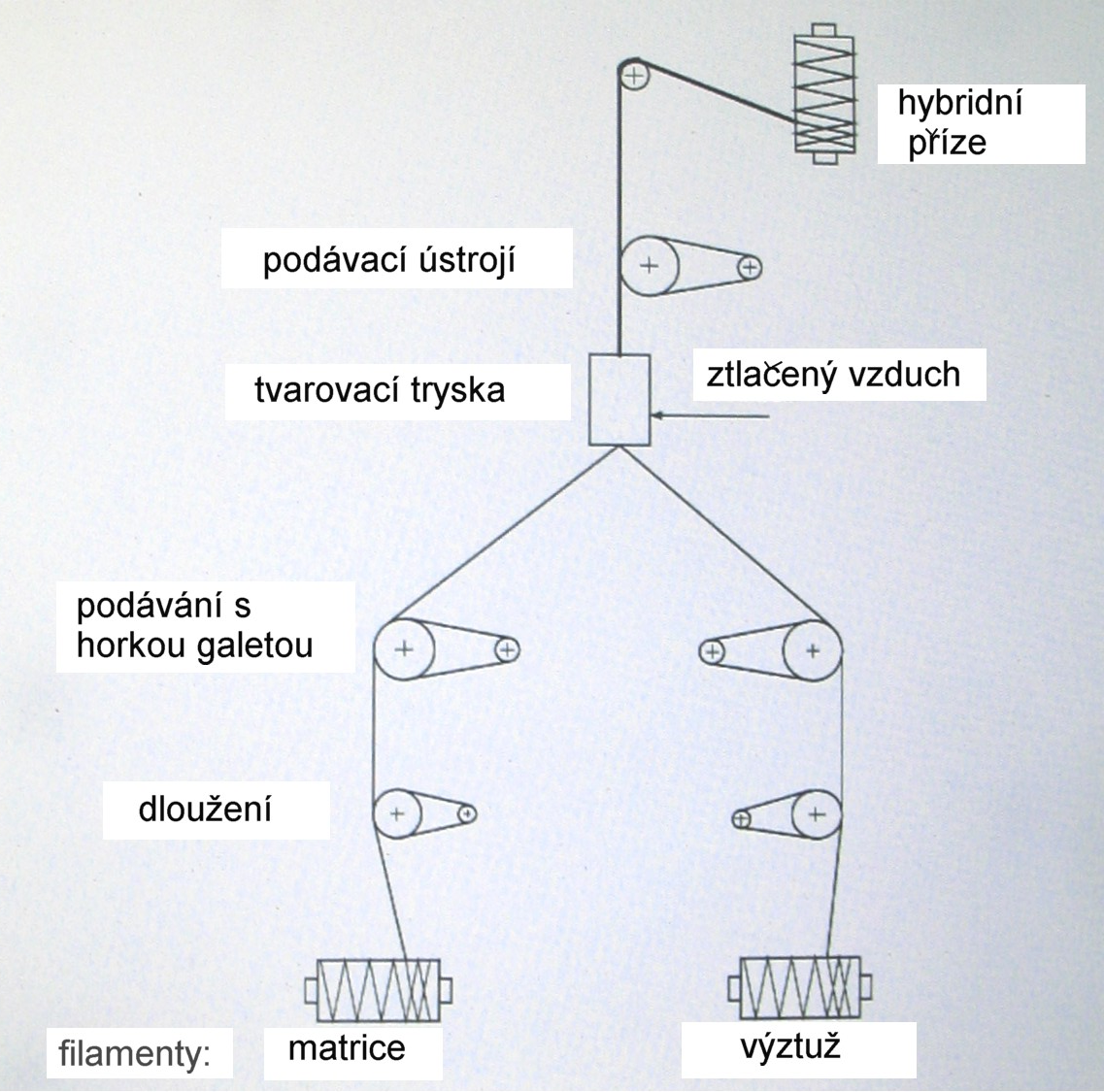 Schema: Comminglinggarn-Hertellung